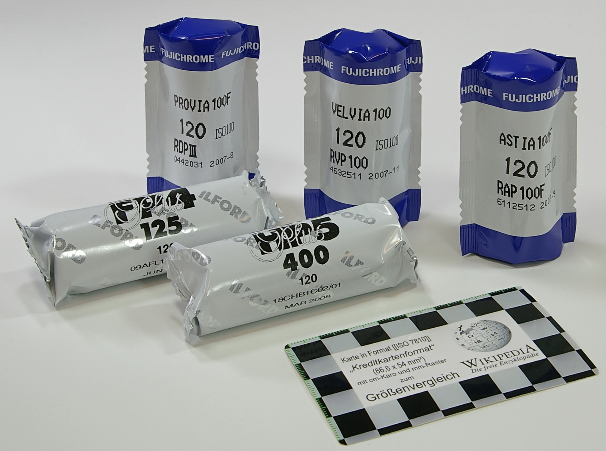 verpackter Rollfilm für Dia- und Schwarzweissfotografie von verschiedenen Herstellern (Fuji (Dia) bzw. Ilford) in mittlerer und hoher Empfindlichkeit.